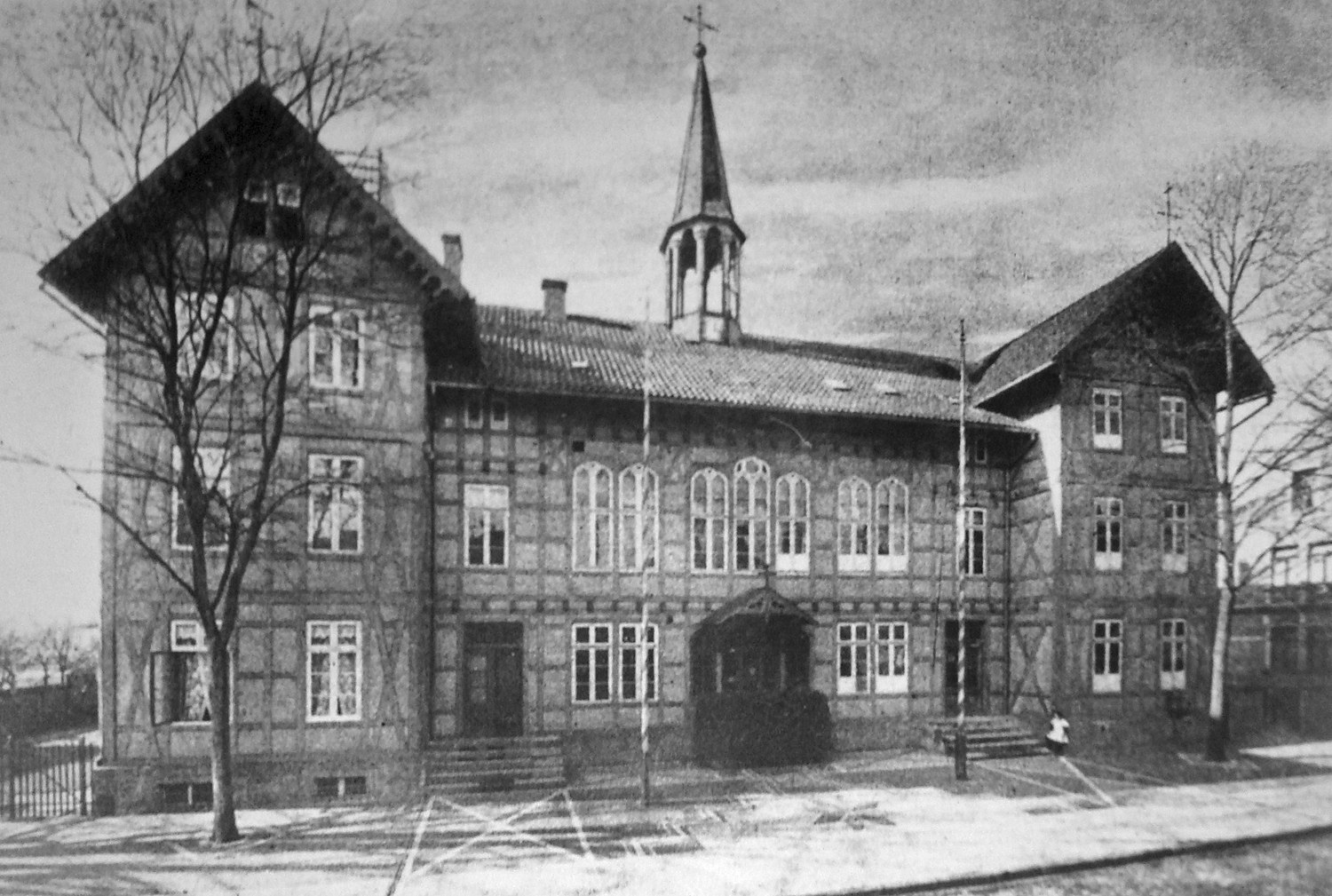 Ursprüngliches Gebäude des Evangelisch Stiftischen Gymnasiums in Gütersloh, Mitte der 1920er Jahre durch einen Neubau ersetzt